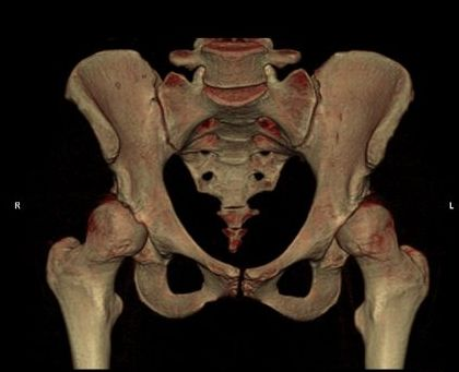 VRT-CT des Beckens mit beds. Dysplasiehüfte